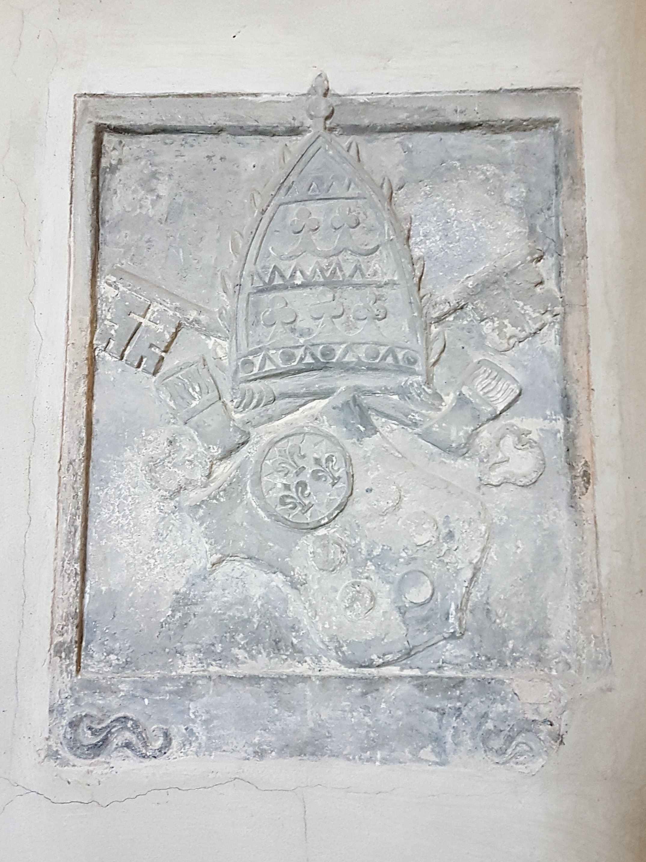 Paavst Leo X vapitahvel Kuressaare linnuse kabelis.